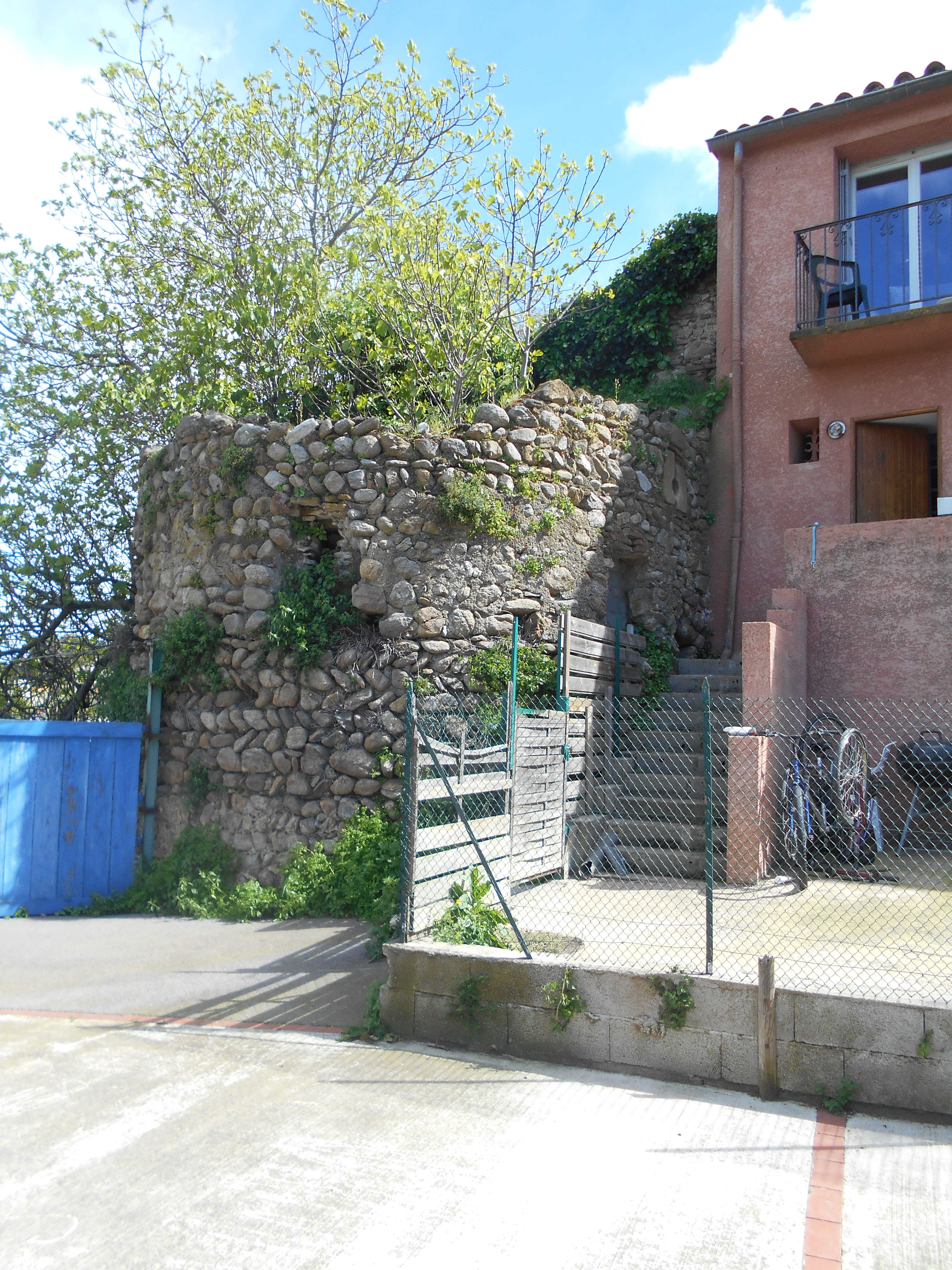 Torre del recinte medieval de Tatzó d'Avall, a Argelers